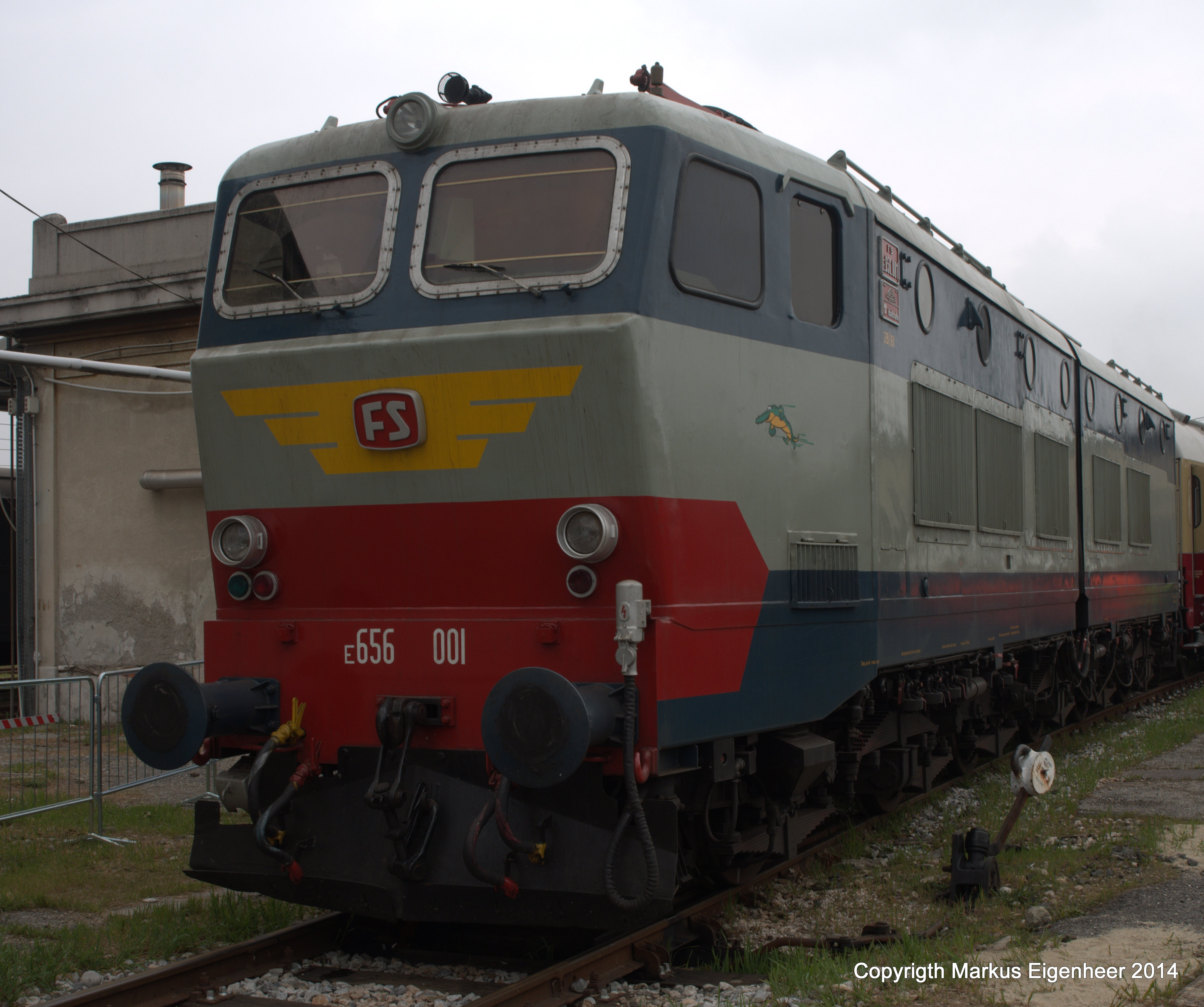 Milano Rialzo 22.03.2014